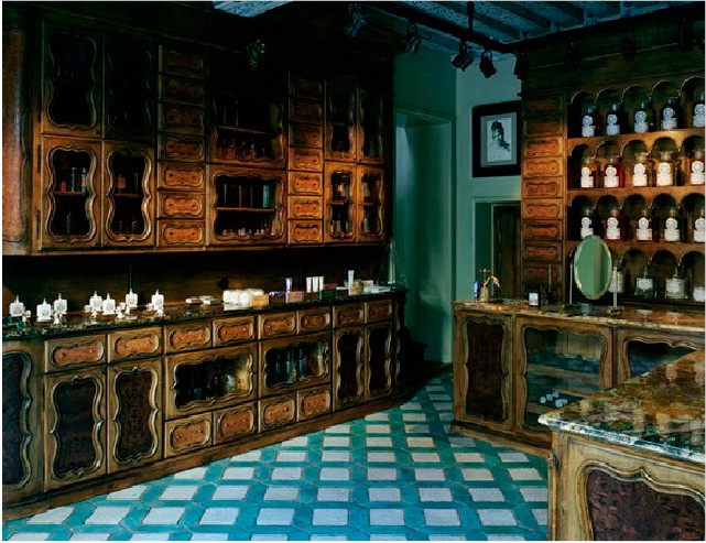 Buly 1803, Rue Bonaparte